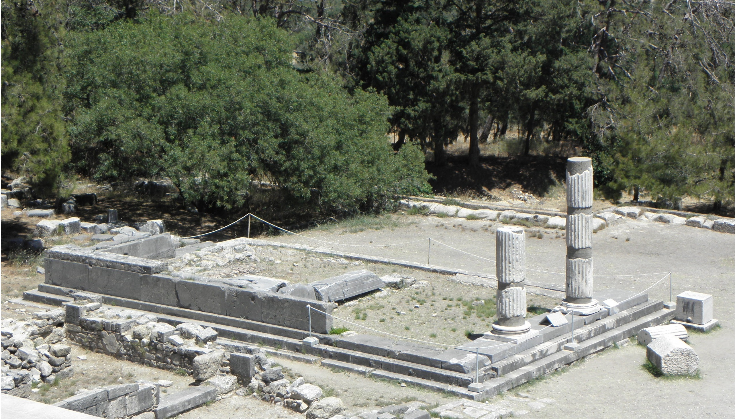 Asklépion - Asklépiův chrám na 2. terase; Kos (GR)